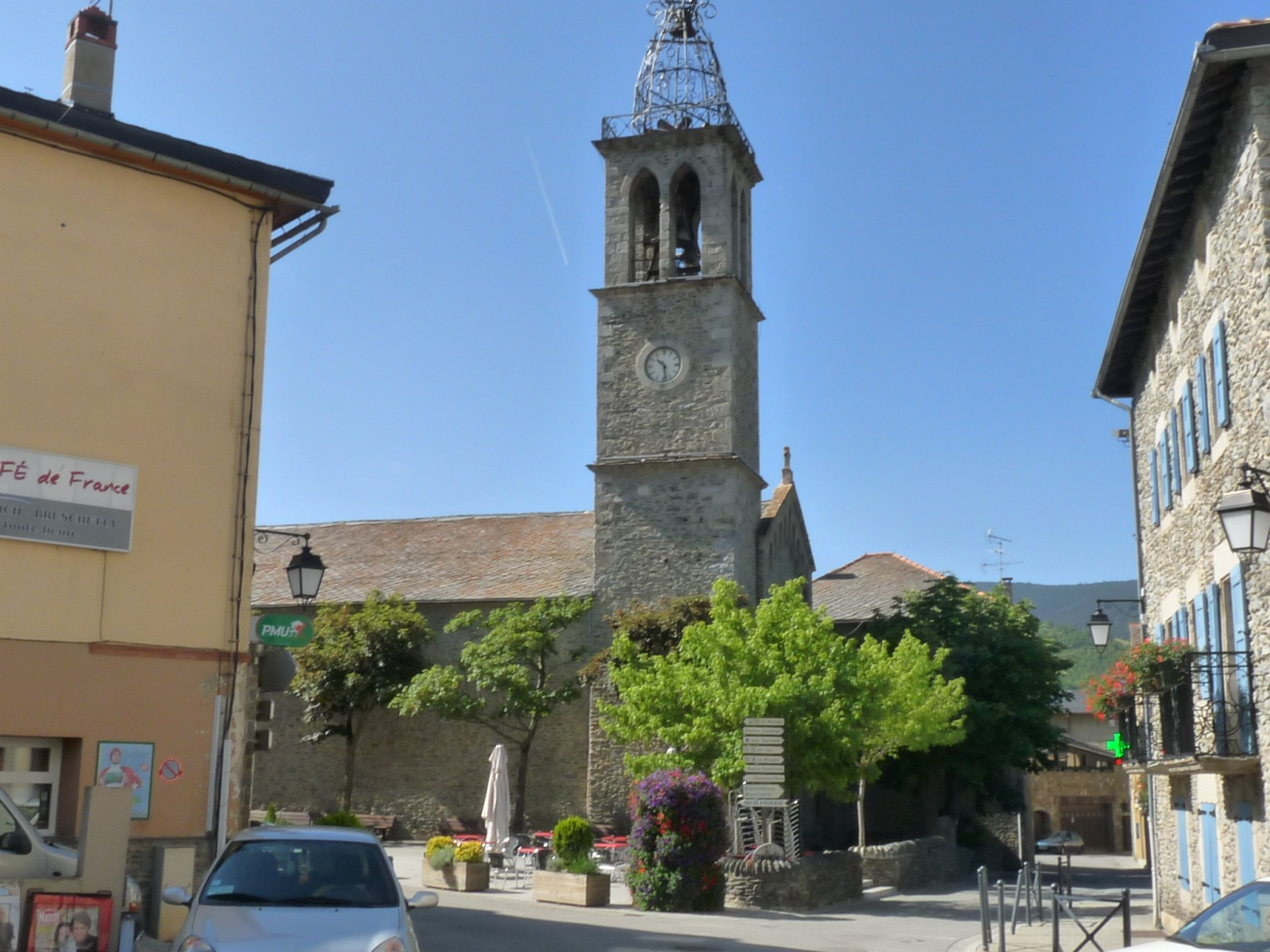 Eglise et place centrale d'Osséja, Pyrénées-Orientales, France